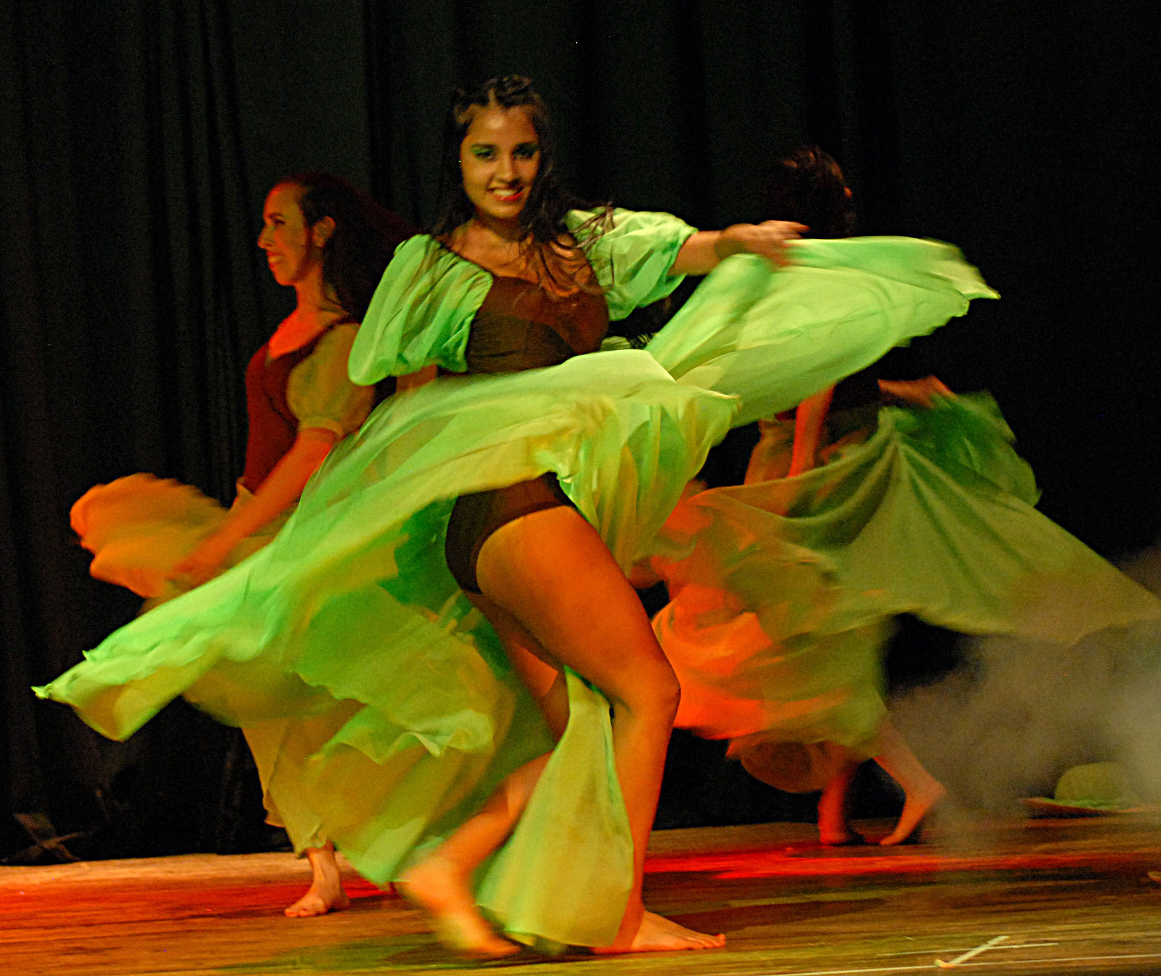 Galopa misionera bailada por artistas del Ballet "Guaynamérica Danza" de Marisil Ceccarini y Berenice Oliveira. Posadas, Provincia de Misiones, Argentina. Fuenteː Periodista Horacio Cambeiro.